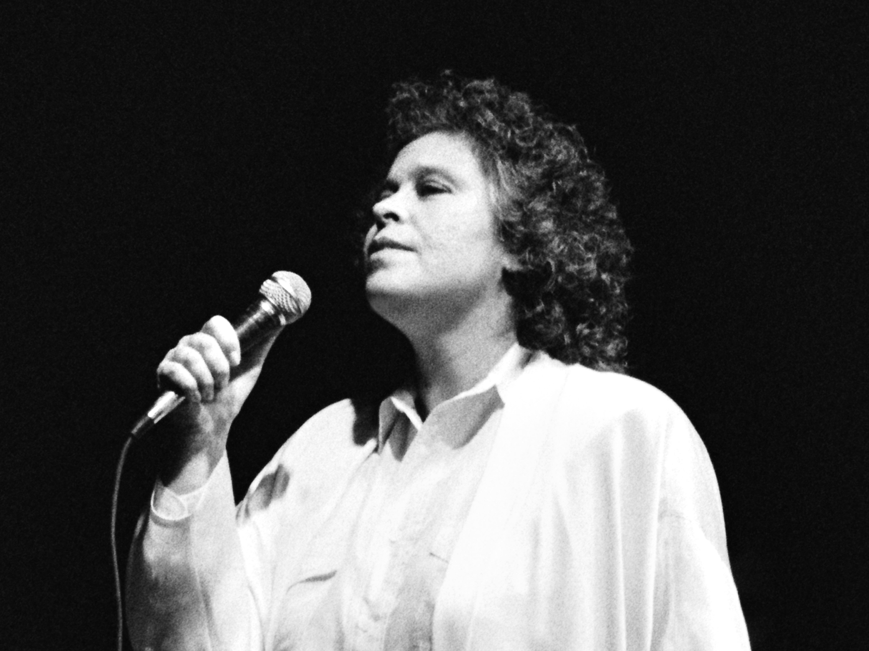 Ο παγκοσμίως γνωστός τραγουδιστής και συνθέτης Δήμητρα Γαλάνη εμφανίζει ζωντανά στην Αθήνα, Ελλάδα (1991) .Φωτογράφησε η Ithaka Darin Pappas